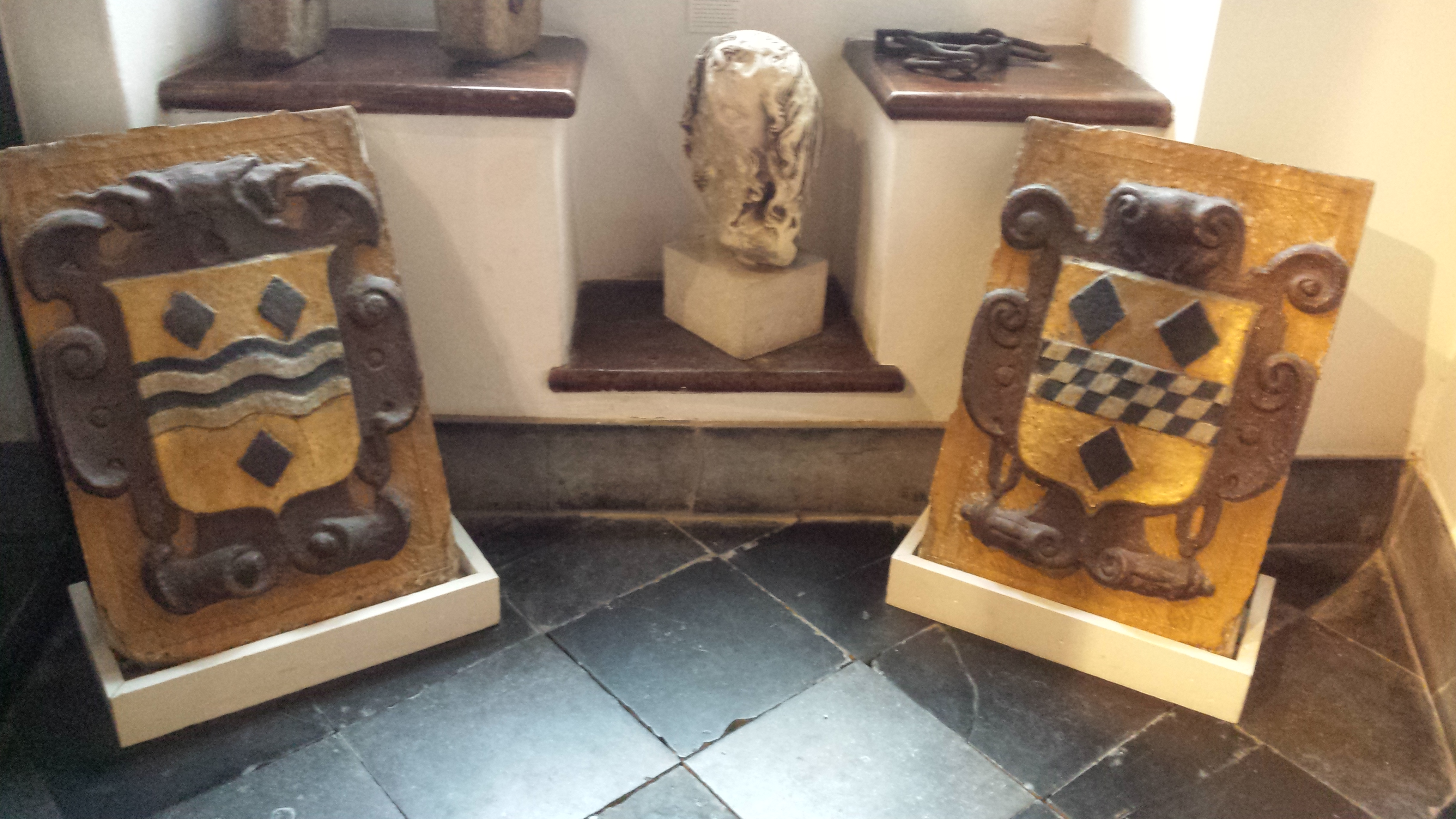 Het stadswapen met het wapen van het Groot-Waterschap van Woerden tijdens een bezoek in het stadsmuseum van Woerden.